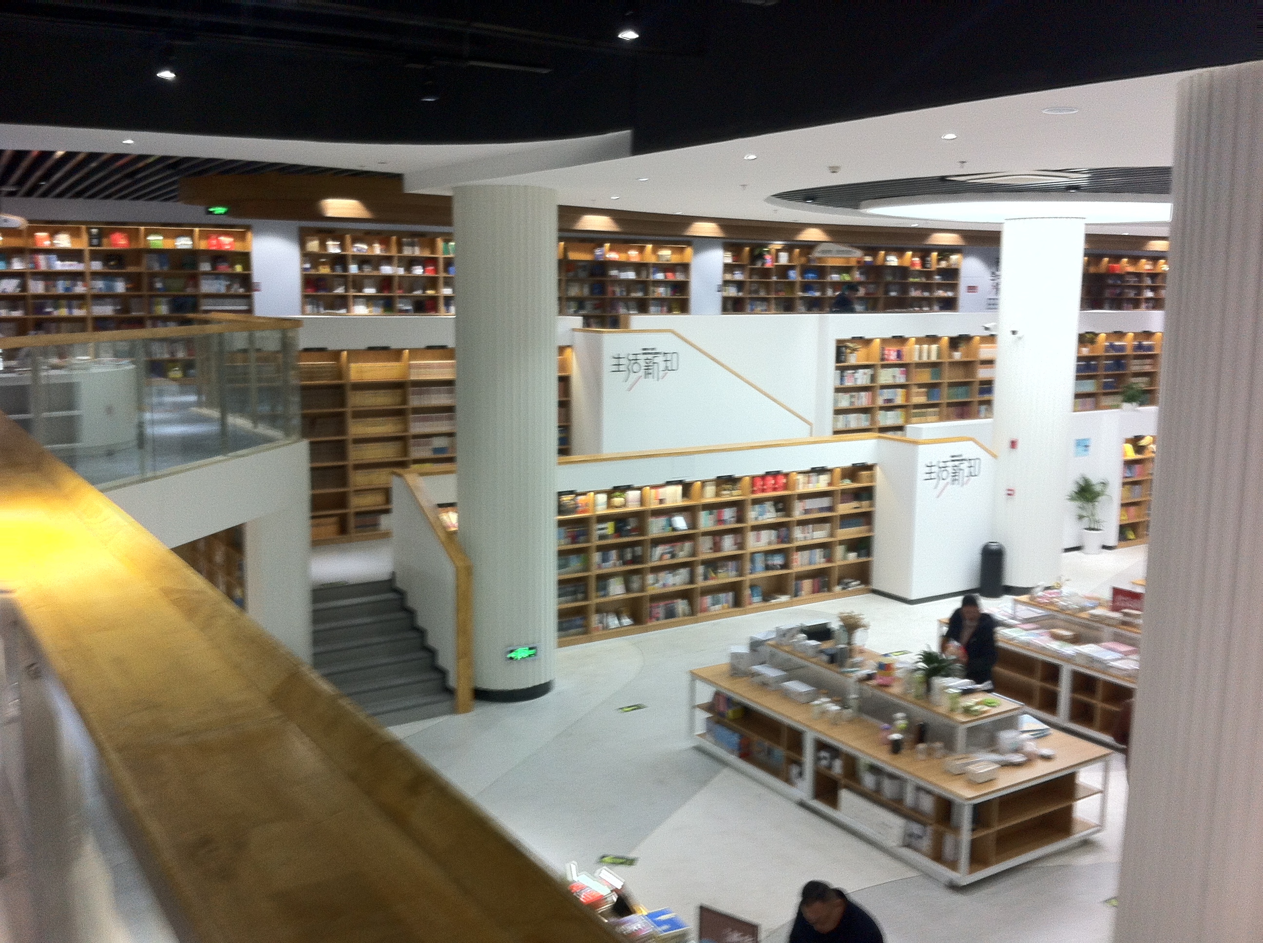 中文（中国大陆）: 玉环书城大门夜景